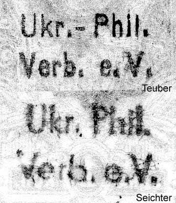 Экспертные знаки основателей Союза филателистов Украины